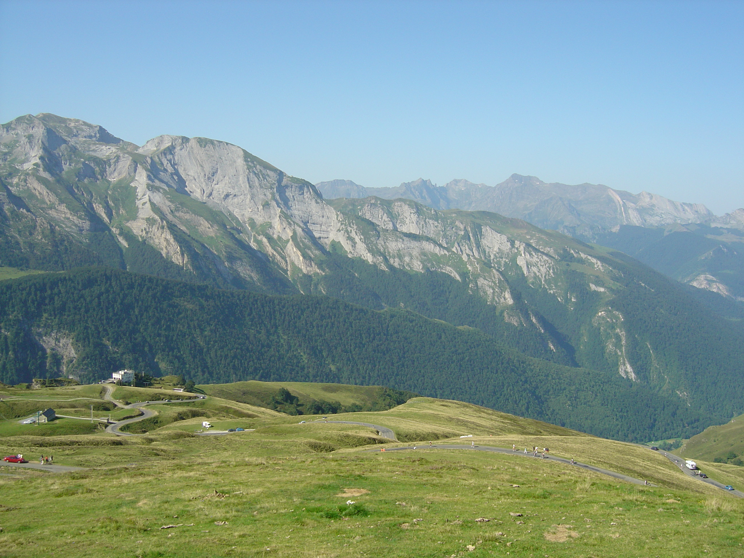 Les deux derniers kilomètres de la route du col d'Aubisque monté depuis Laruns. On voit l'hôtel des Crêtes Blanches plus bas à gauche et des coureurs en terminant avec l'ascension.